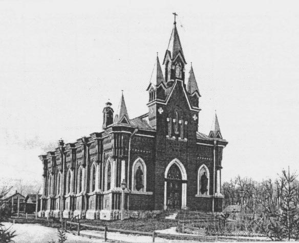 Католический храм Петра и Павла